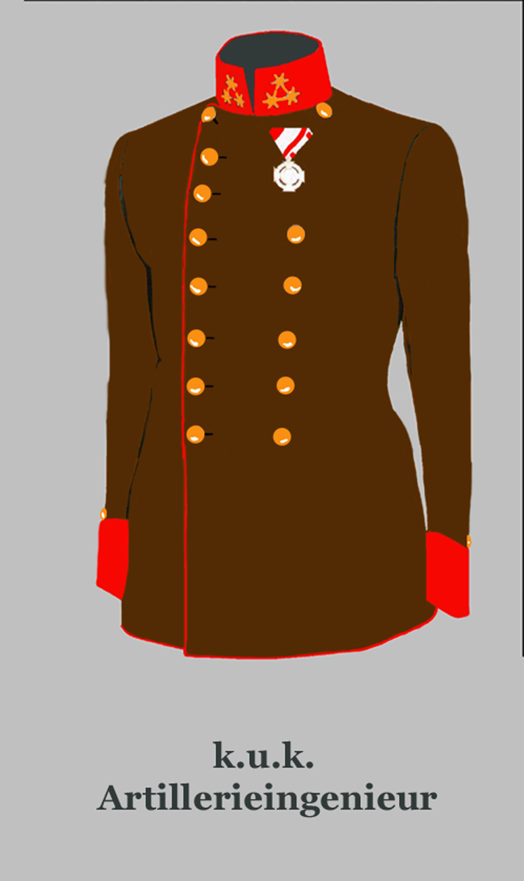 Waffenrock eines k.u.k. Artillerieingenieur